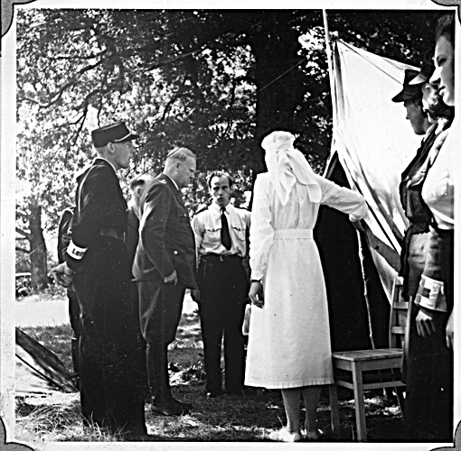 RA/PA-0750/Gk/0001 (album) 1113 Bildet er fra Nasjonal Samlings 8. stevne i nasjonalparken ved kongegravene i Borre utenfor Horten i Vestfold, omtalt som pinse- eller Borrestevnet, i pinsehelga 1943. Arrangementet begynte lørdag 12. juni og varte til 2. pinsedag, mandag 14. juni. Ifølge NTBs reportasje i Aftenposten dagen etter ankom Quisling med følge leiren i bil på formidddagen den siste stevnedagen. Han ble møtt av mange heil og sæl-rop. Etter en enkel middag inspiserte Quisling området sammen med leirlederen, NS' fylkesfører Thore Tjersland. Klokka 14.00 begynte det som ble beskrevet som stevnets høydepunkt. Da var det parade og defilering for føreren ved Borre kirke. Oppmarsjen ble etterfulgt av et folkemøte i parken klokka 14.30 med tale av ministerpresidenten. Både fylkespropagandaleder Bjarne Steff og NS’ fylkesfører i Vest-Viken Fylkesorganisasjon ønsket velkommen før hovedtalen. I Filmavisen 28. juni 1943 er det en propagandareportasje fra stevnet, og i Egil Christophersens Vestfold i krig side 160 skriver forfatteren mer om Borreparkens rolle som NS' viktigste mønstringsplass. Nasjonal Samling, forkortet NS, var et norsk politisk parti som ble grunnlagt av Vidkun Quisling i 1933 og ble oppløst ved frigjøringa i 1945. Partiet la seg etterhvert nært opp mot nasjonalsosialismens ideologi og ble støtteorganisasjon for den tyske okkupasjonsmakta i Norge under andre verdenskrig.